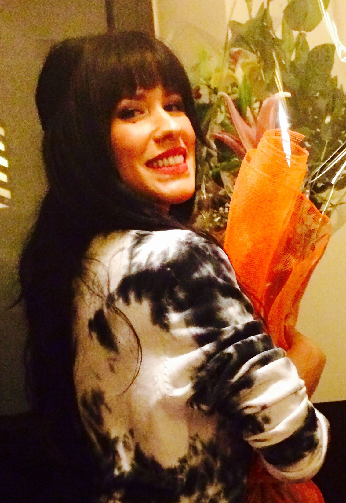 Baby K (pseudonimo di Claudia Nahum), rapper e cantante italiana.